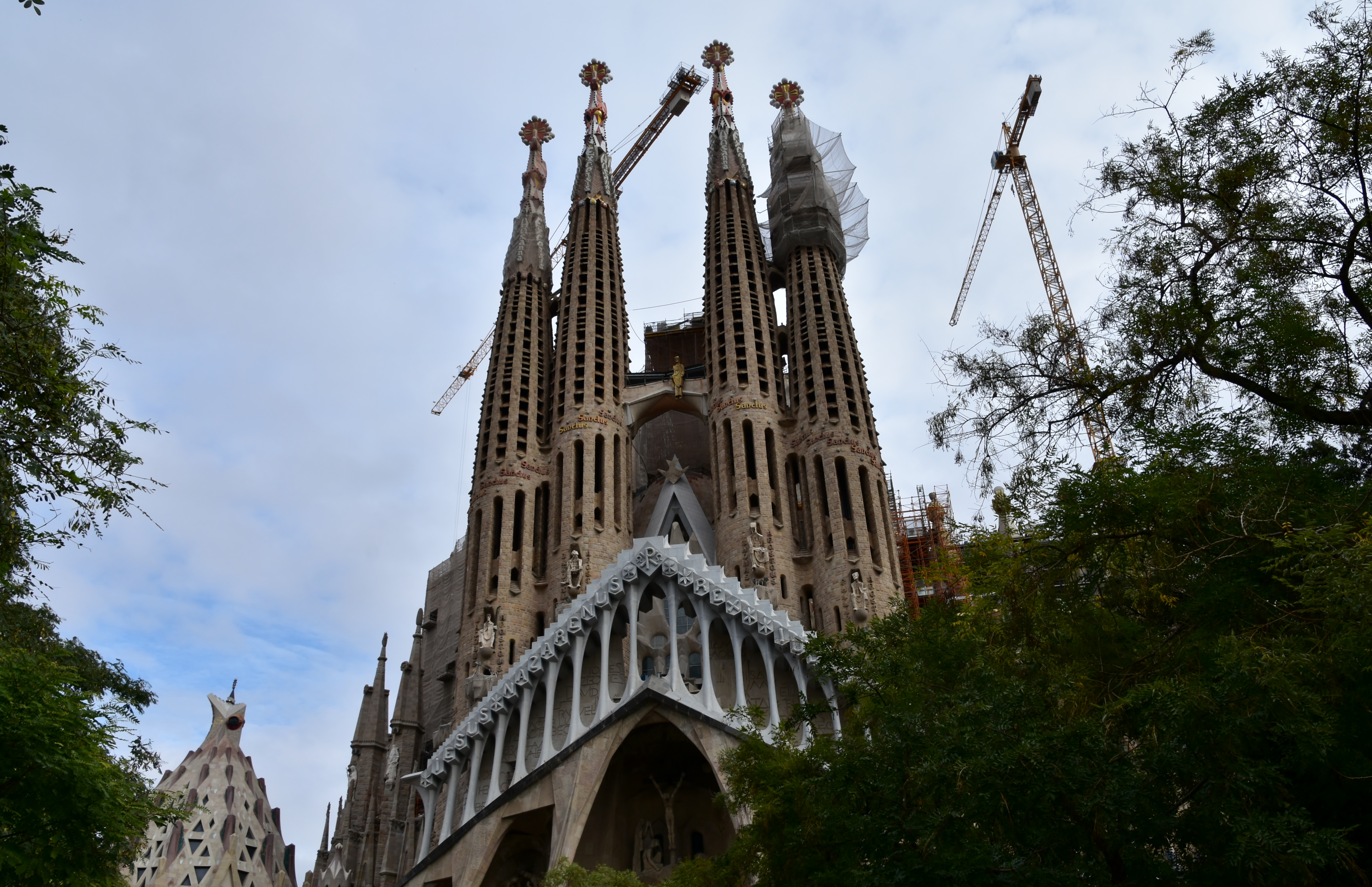 Sagrada Familia, Passion Facade (15)